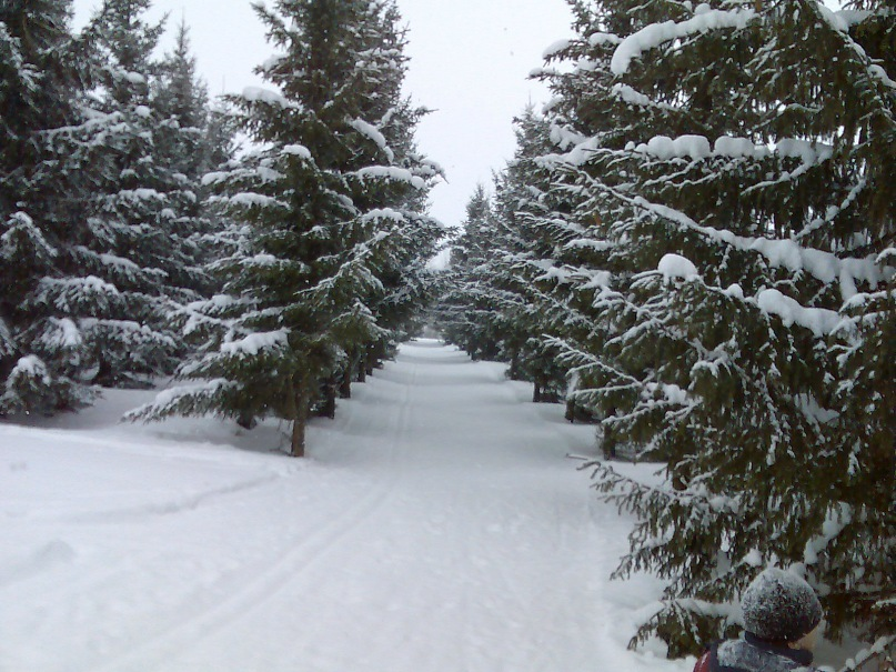 Зимний парк в Ст.Каменке